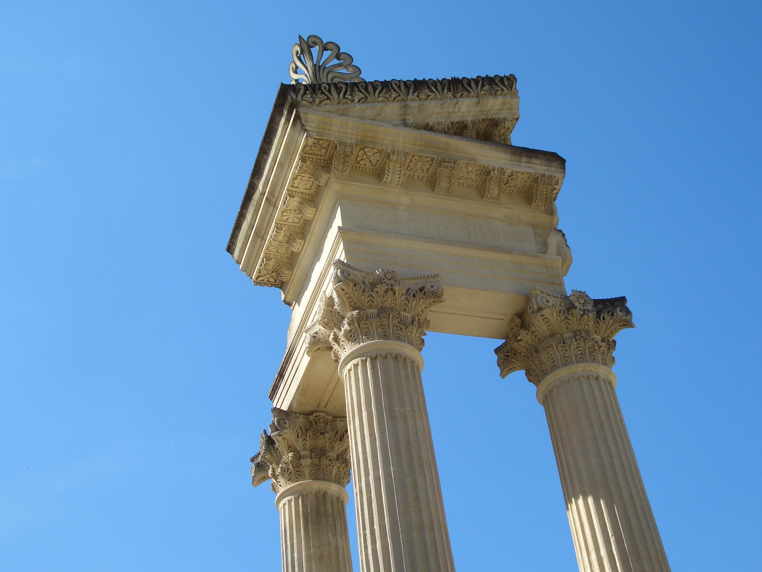 Saint-Rémy-de-Provence (Bouches-du-Rhône), Site archéologique de Glanum. Pour rendre le monument plus parlant, il a été décidé de réaliser une restitution de l'angle du plus petit des temples géminés (les temples géminés étaient dédiés au culte des familles impériales), l'ouvrage est donc représenté en grandeur nature pour permettre aux visiteurs de se rendre compte de l'échelle des constructions initiales.